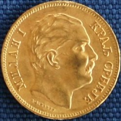 Goldmünze 20 Dinara mit Milan I von 1882